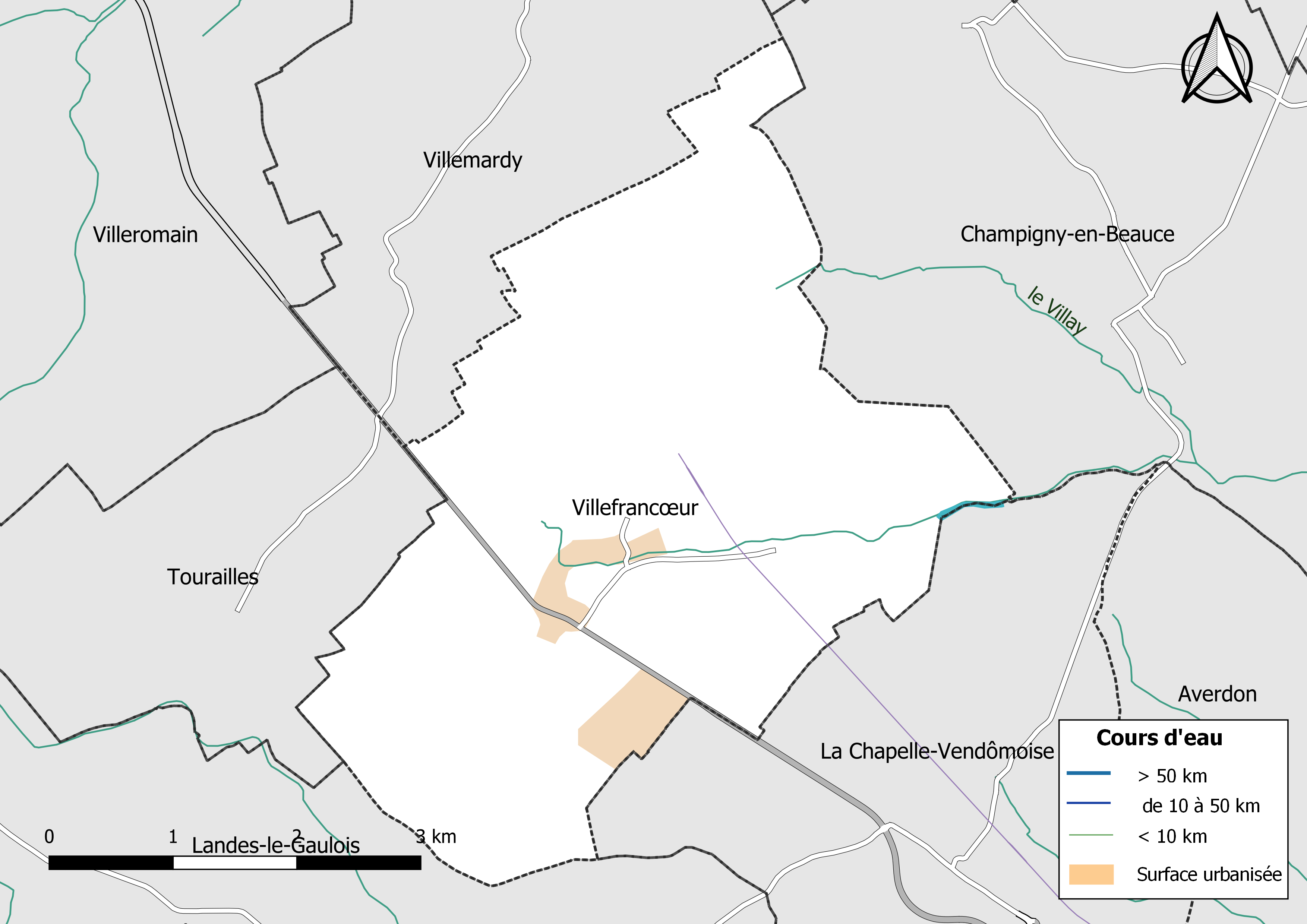 Carte du réseau hydrographique de la commune de Villefrancœur (Loir-et-Cher, France).